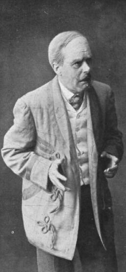 El actor español Ernesto Vilches caracterizado para la obra de teatro El centenario, de los Hermanos Álvarez Quintero